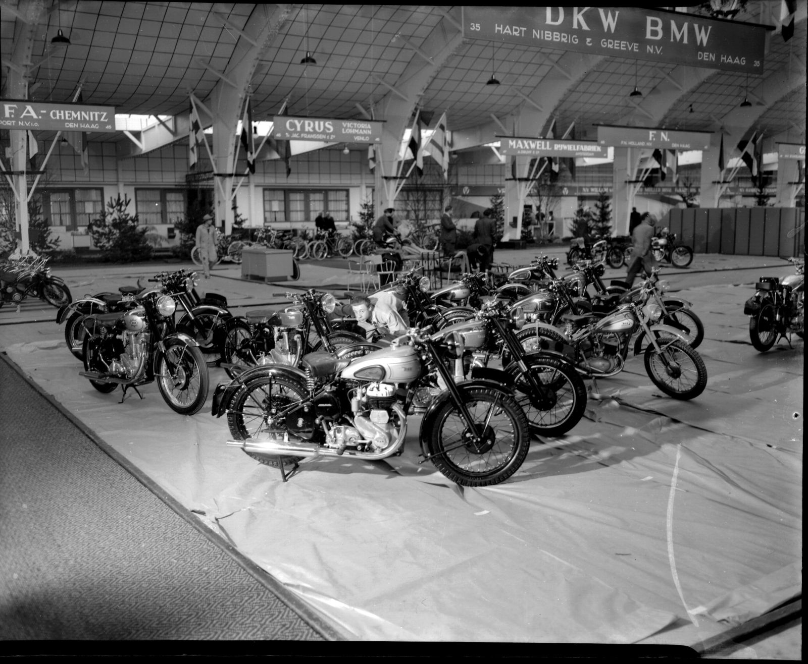 Voorbereidingen voor de 29e tentoonstelling van Motorrijwielen, rijwielen met hulpmotor, scooters etc. in de Rai (9-18 februari), Amsterdam, 6 februari 1951 Foto Ben van Meerendonk / AHF, collectie IISG, Amsterdam